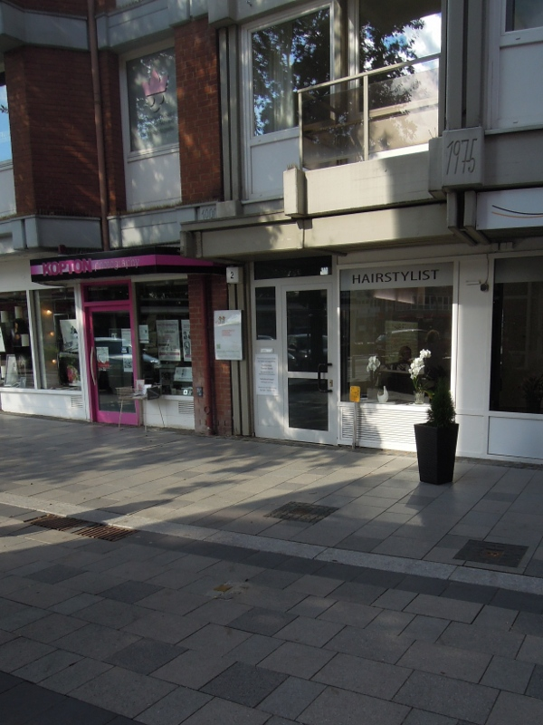 Lage des Stolpersteins für Hugo Stoltze in Bergedorf Hude 2